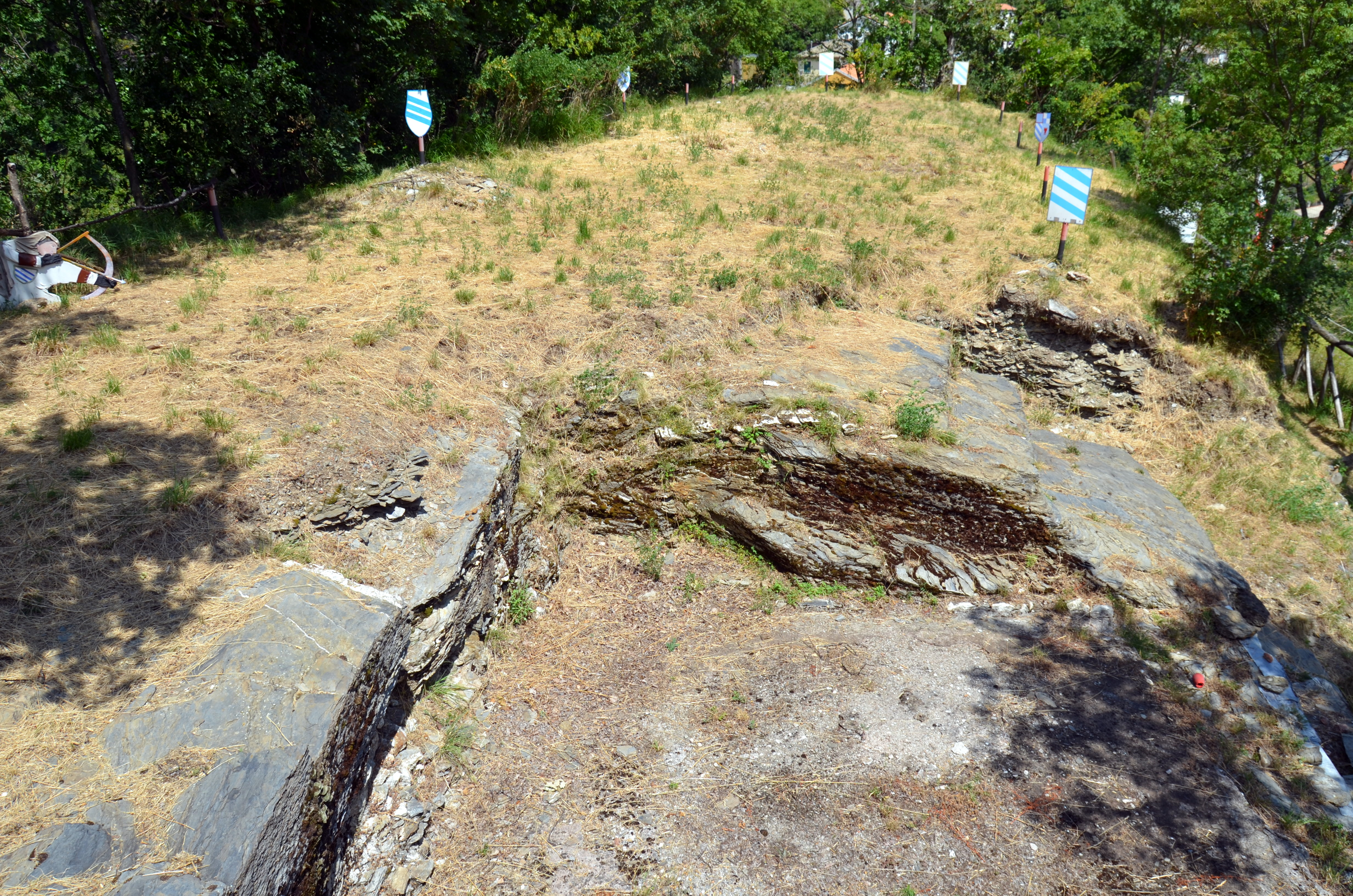 Ruderi del castello dei Fieschi di Roccatagliata, Neirone, Liguria, Italia